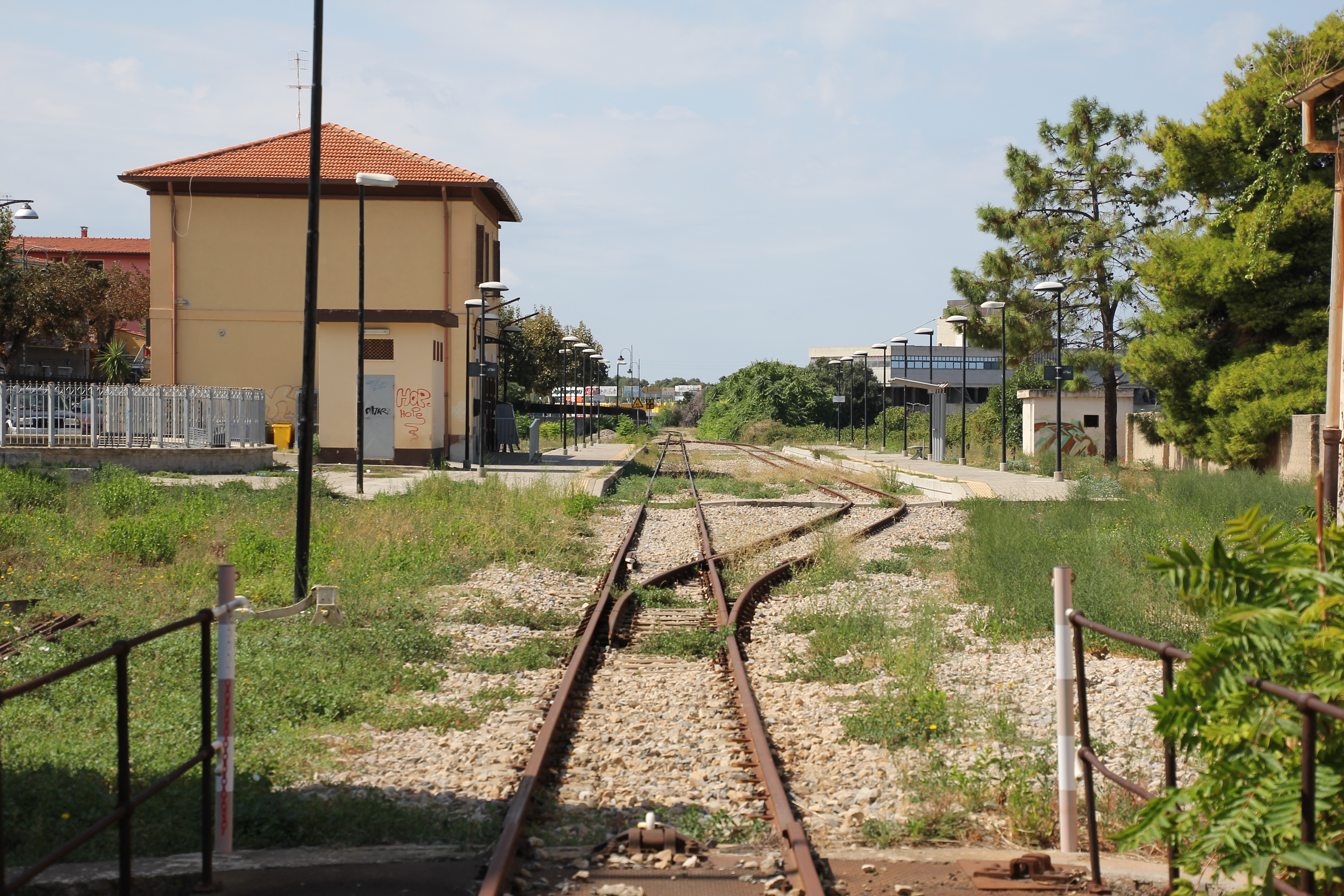 Sorso, stazione ferroviaria